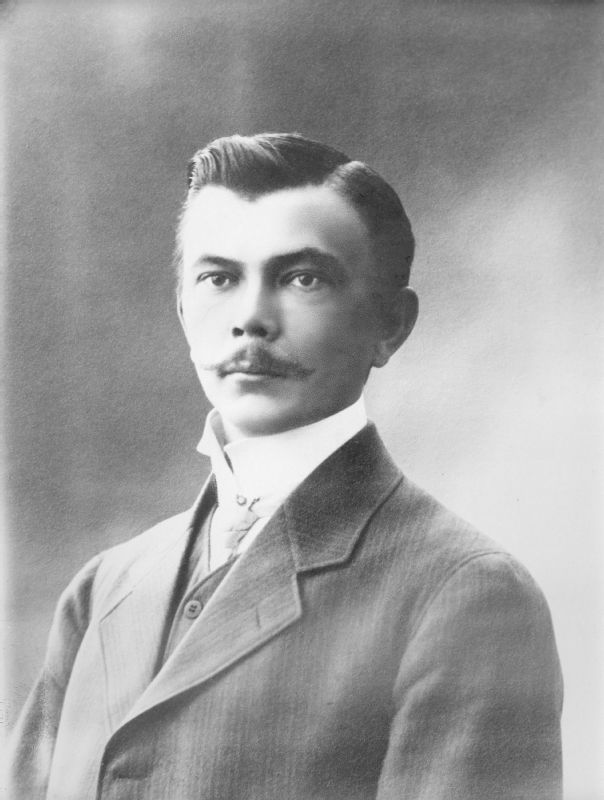 Tehtailija Sulo Salmelin